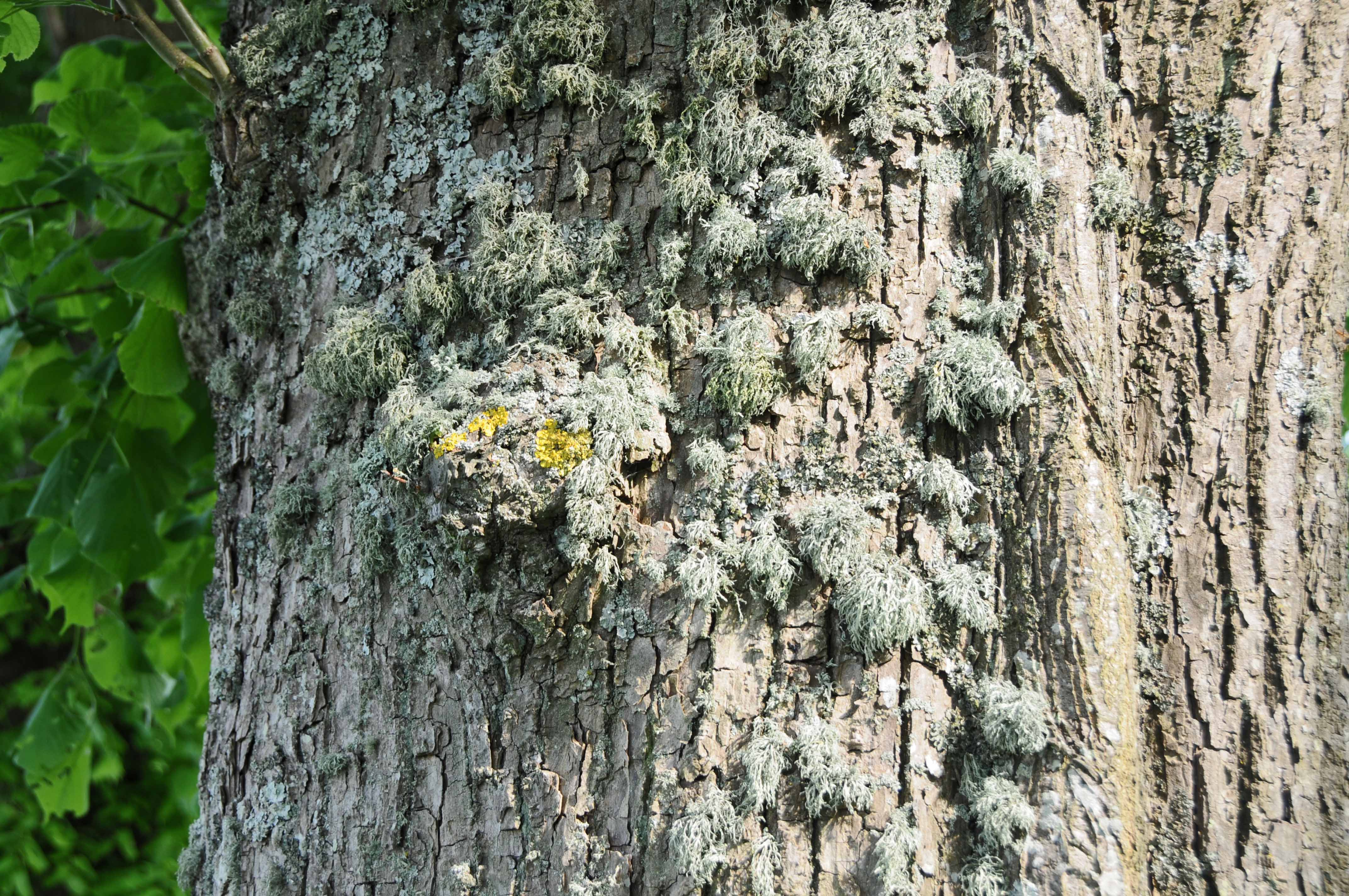 Flechten op enger Lann (Gréiwelshaff).